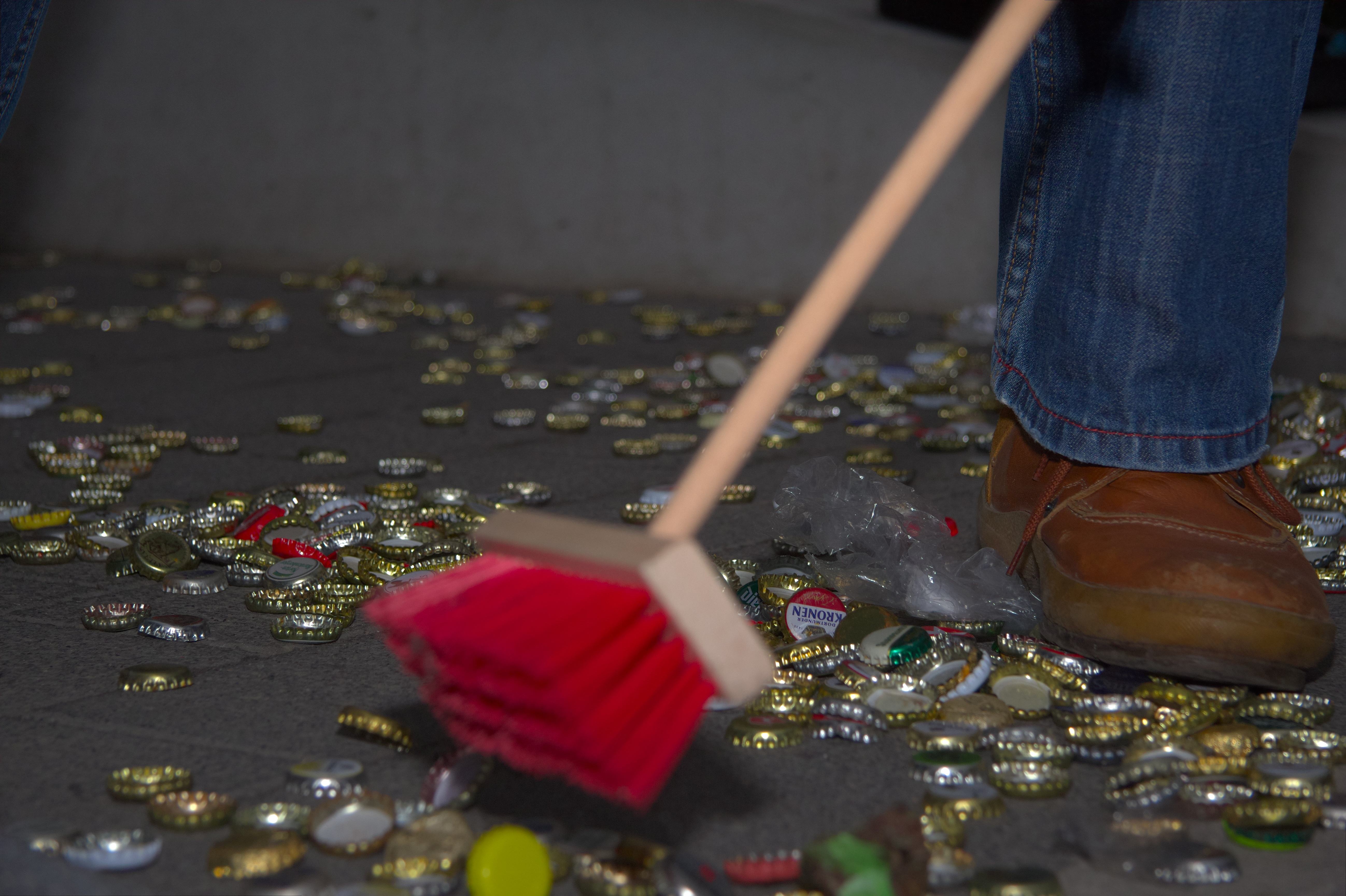 Kronkorken